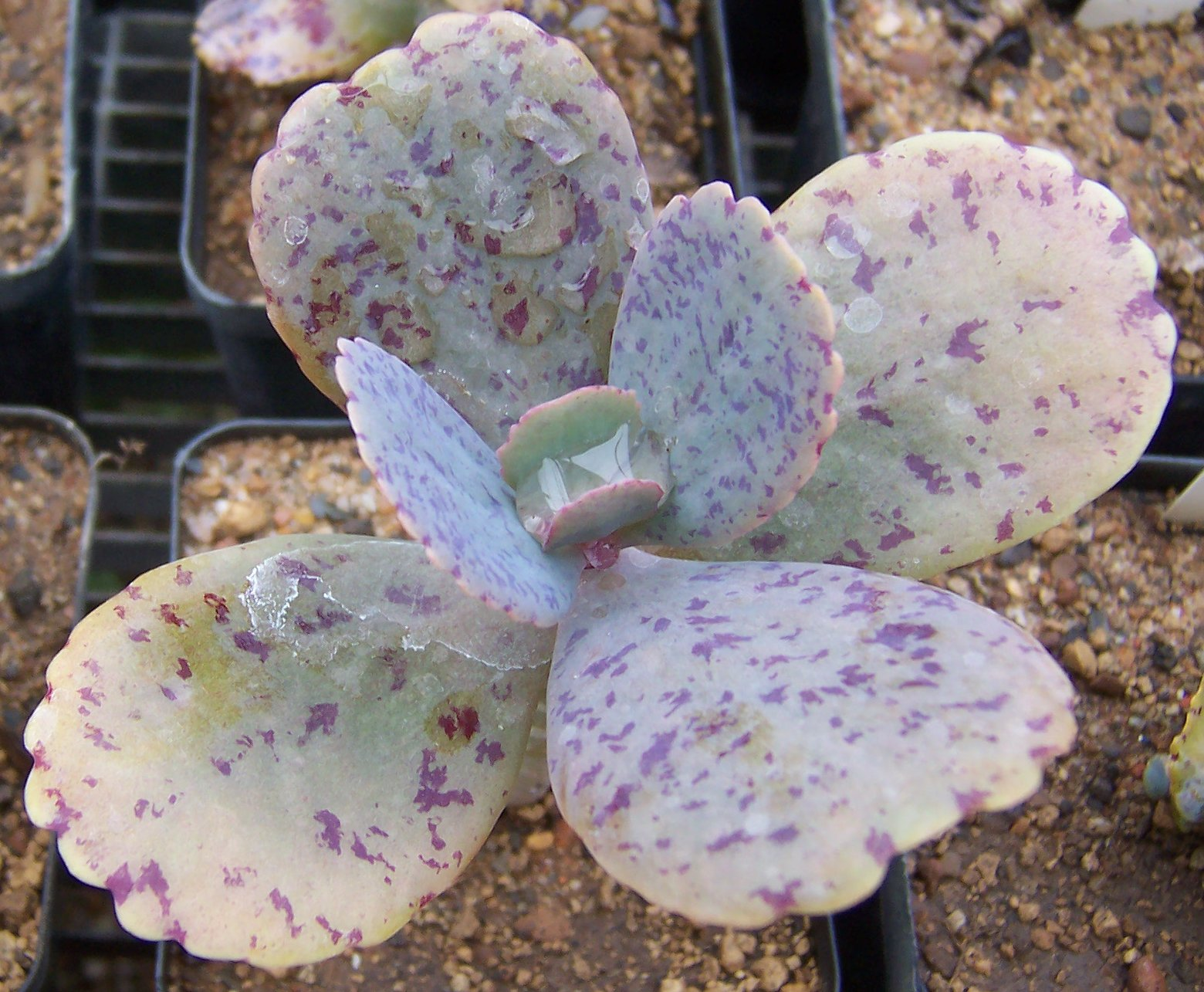 Kalanchoe marmorata, young plant